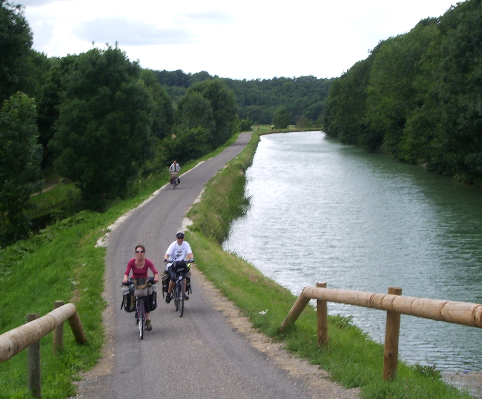 Cyclo-campeurs le long du canal de la Marne-au-Rhin